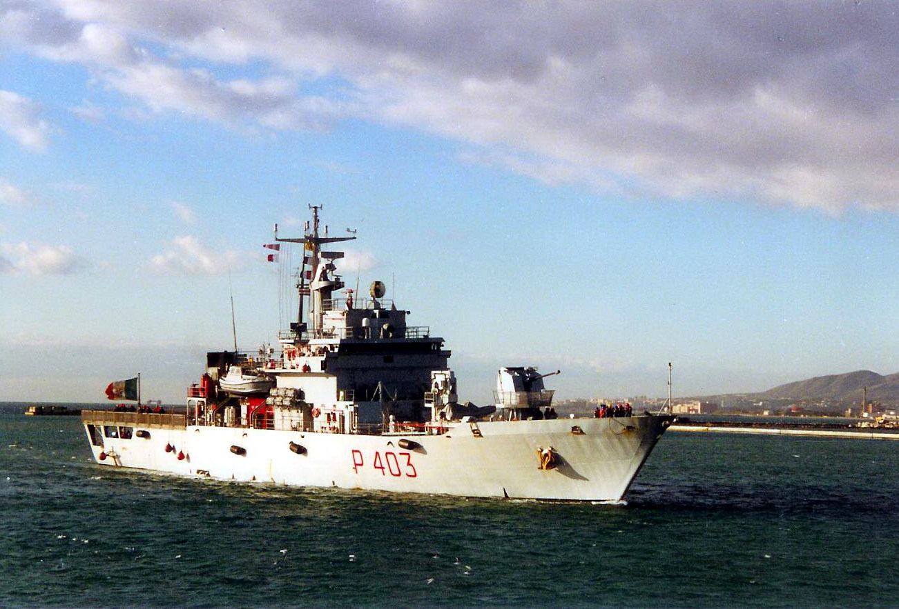 Il pattugliatore Spica lascia Malaga